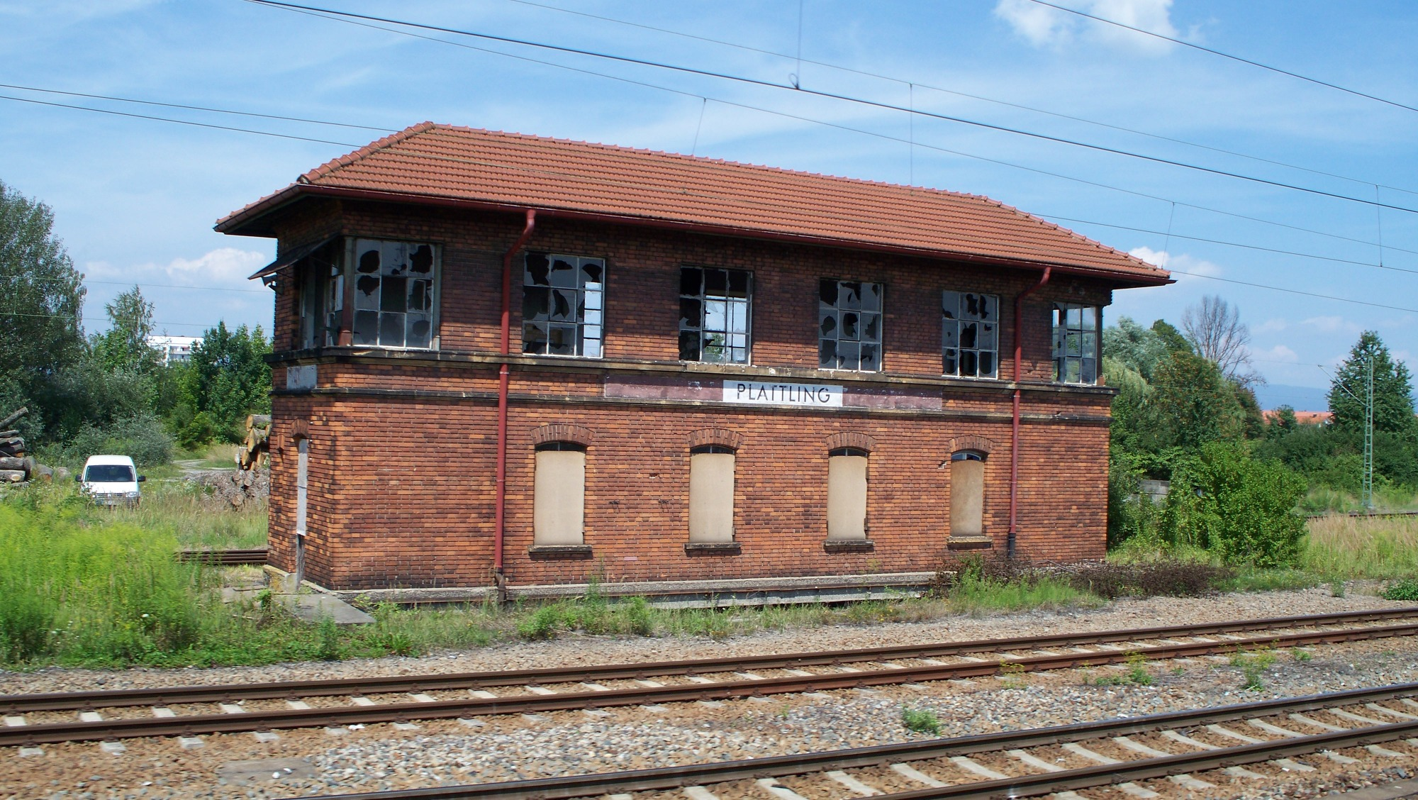 Halb verfallenes Stellwerk im Bahnhof von Plattling.